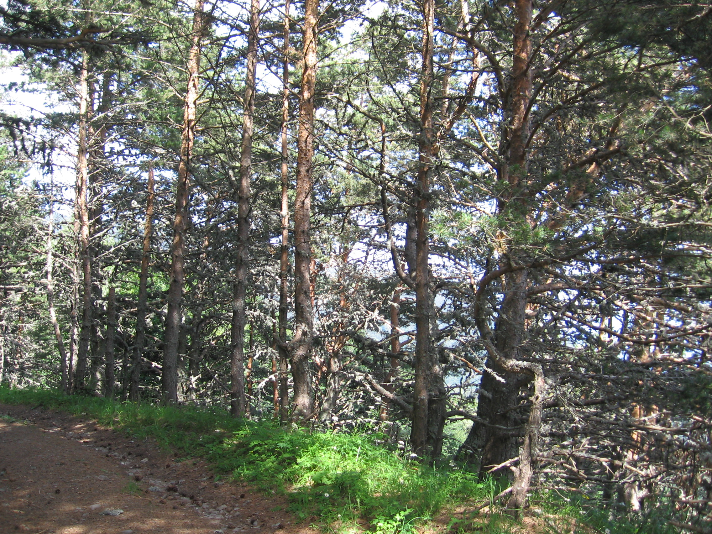 Фото